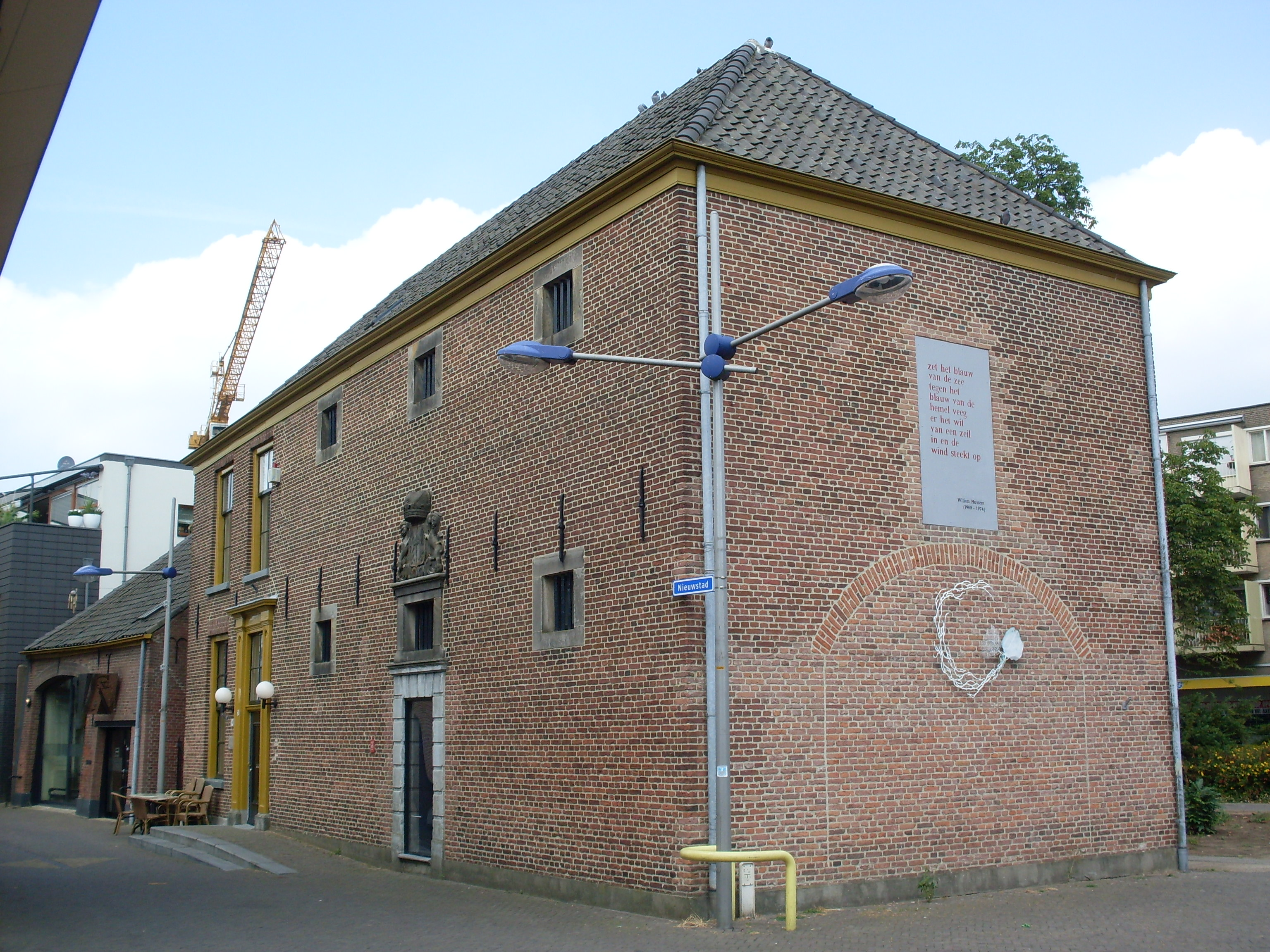 Het Gevang te Doetinchem